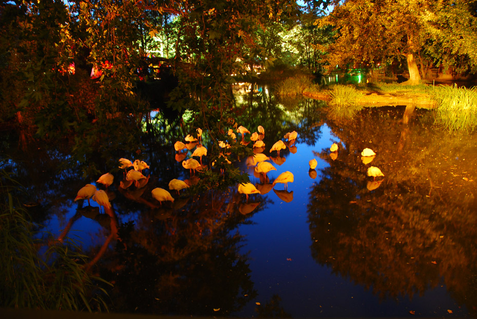 Kölner Zoo: Sommernacht in Zoo und Flora 2007